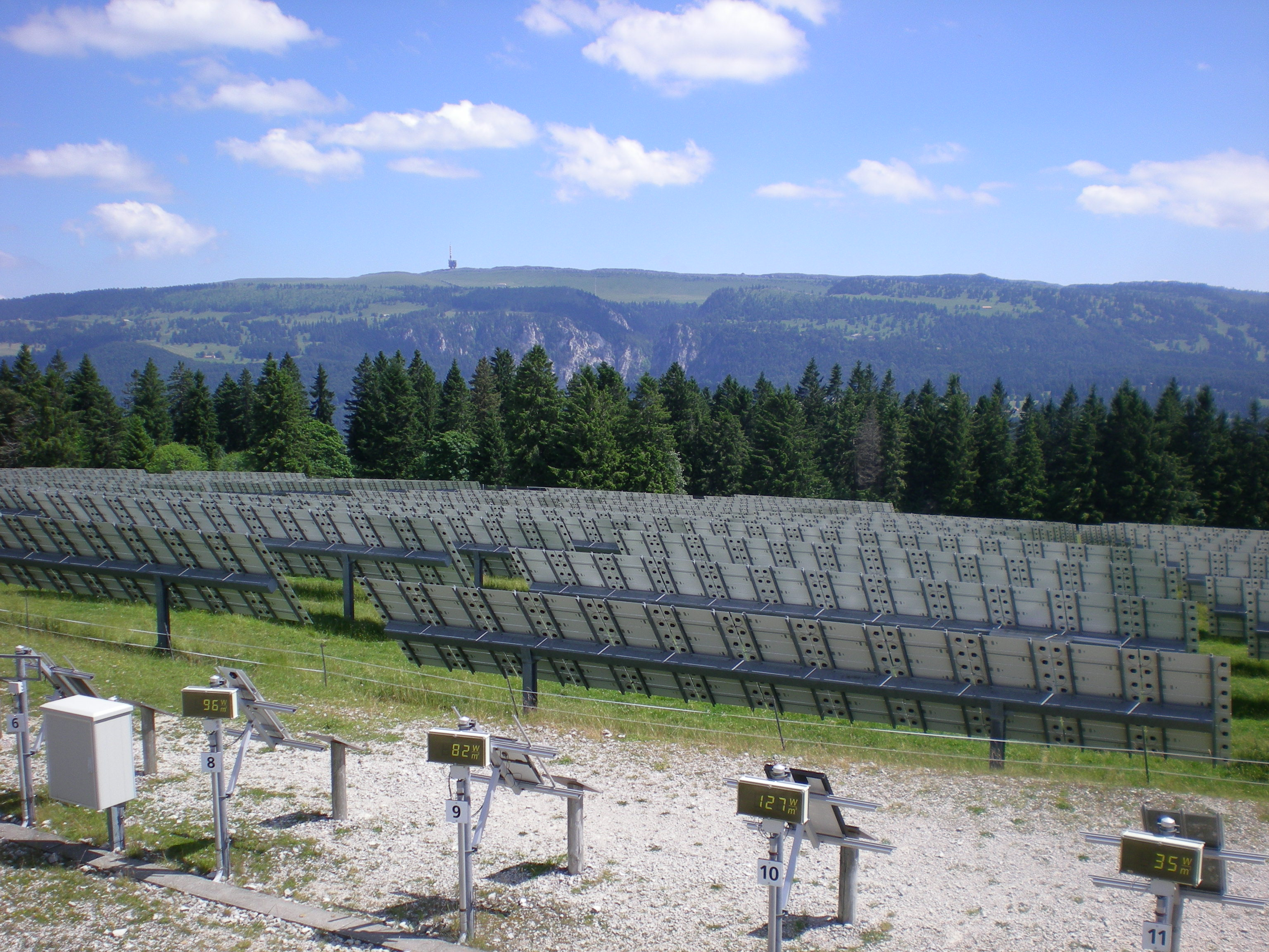 Mont Soleil, neue Solarzellen mit verschiedenem Wirkungsgrad